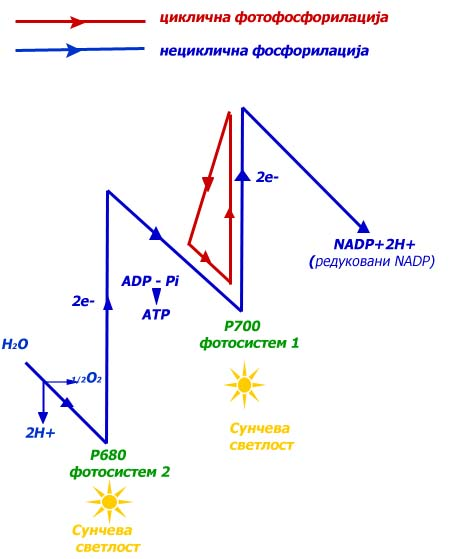 Description: Svetla faza fotosinteze Source: self-made